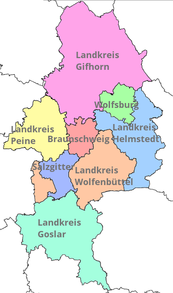 Karte der Region Braunschweig mit ihren Städten und Landkreisen.